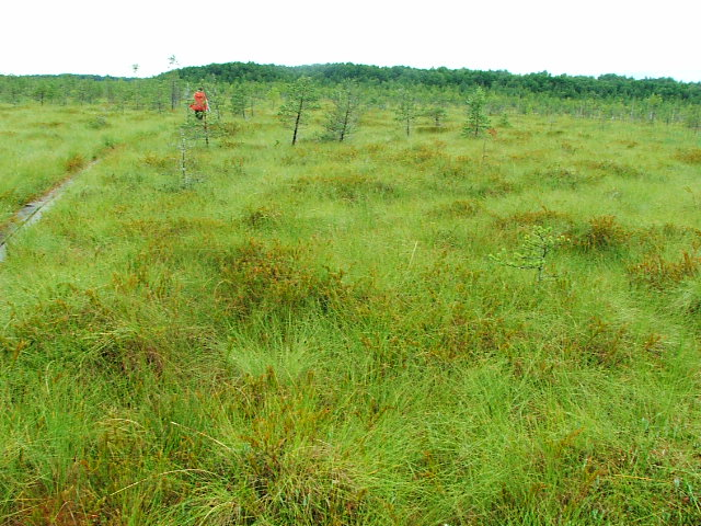 Полистовский заповедник, Бежаницкий район This image is related to the protected area of Russia number 6000012